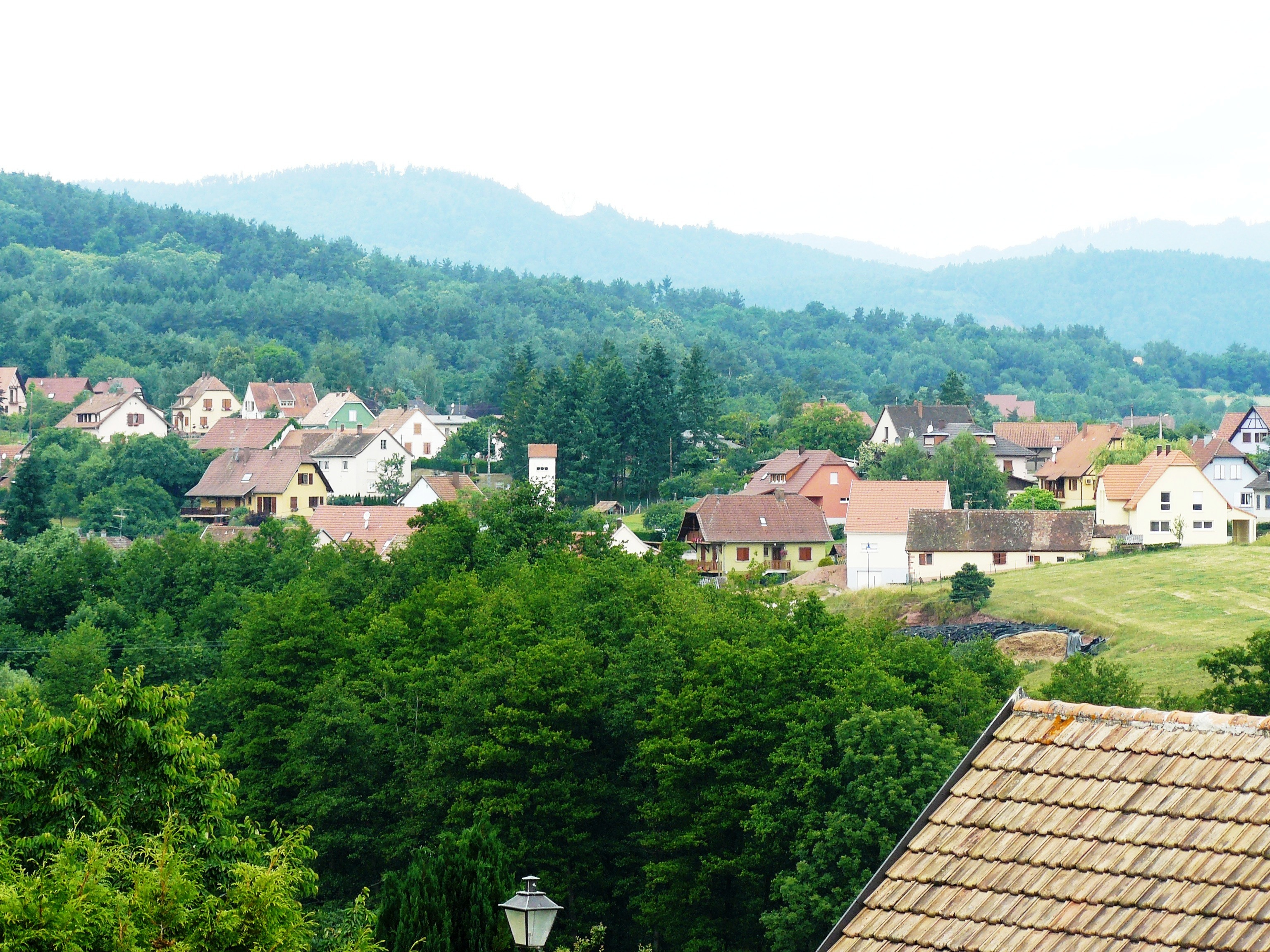 Vue sur le hameau de Hirtzelbach